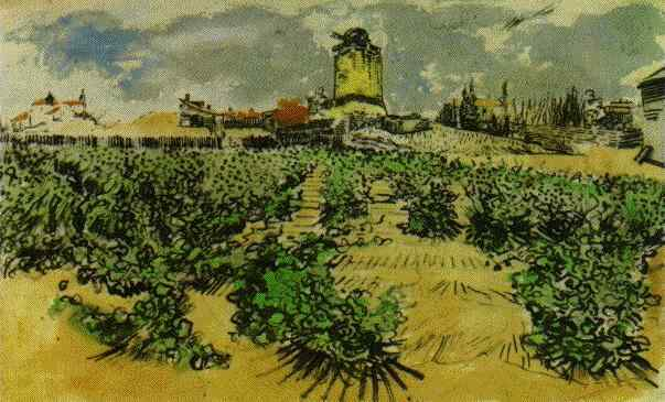 Pintura estancia en Arles